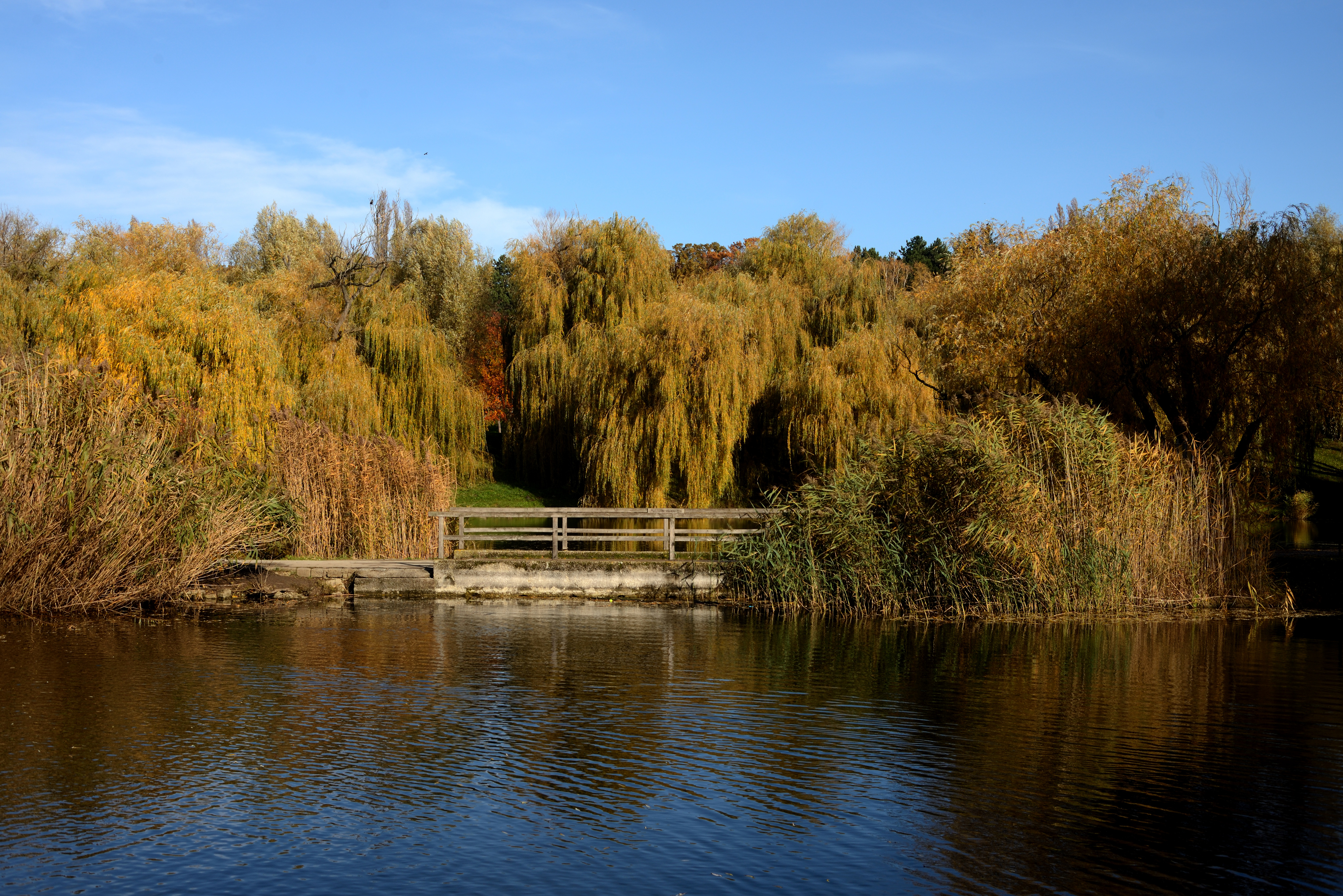 Durchlass im Volkspark Laaer Berg, Objekt B103700